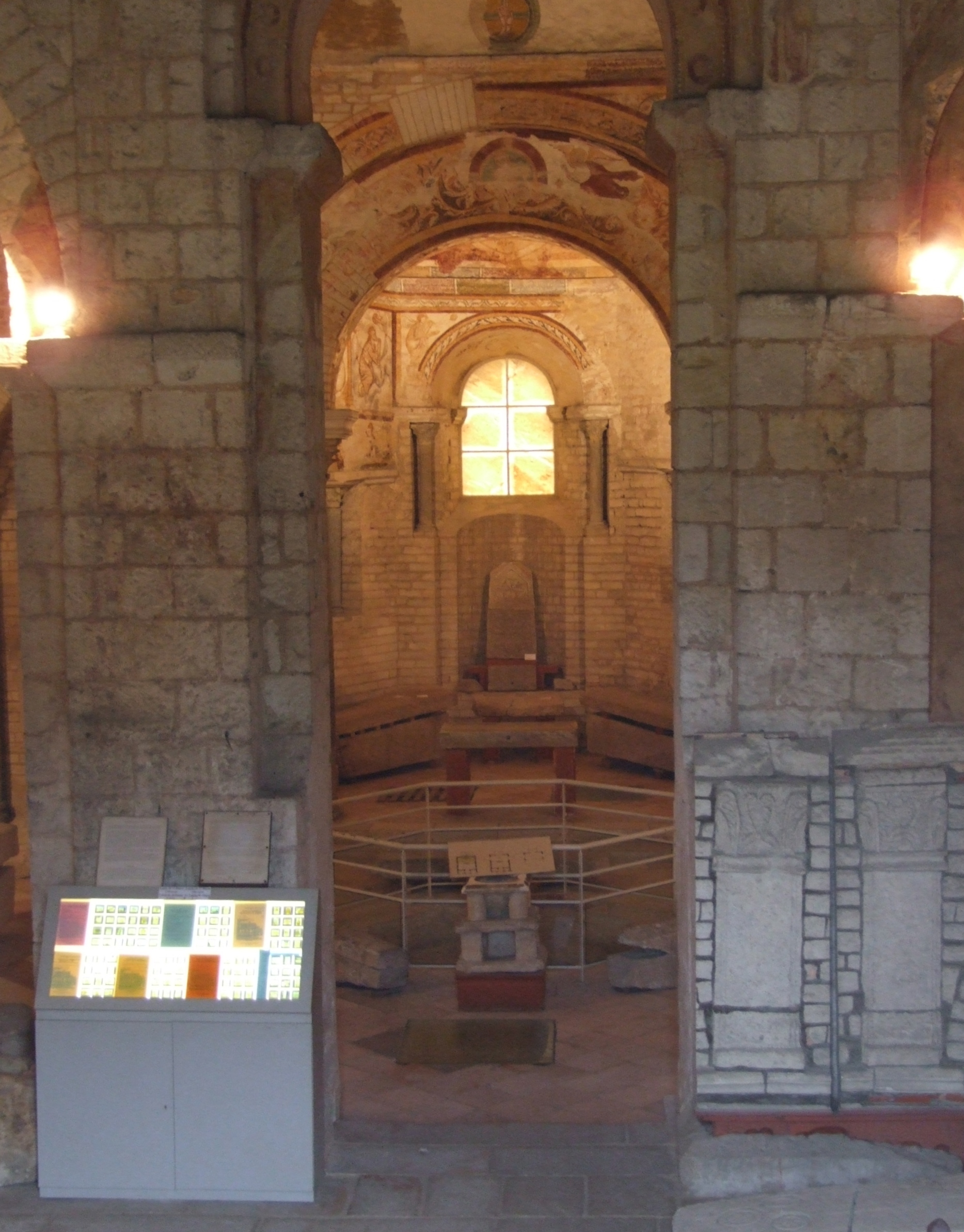 Baptistère Saint-Jean, Poitiers, Poitou-Charentes, FRANCE